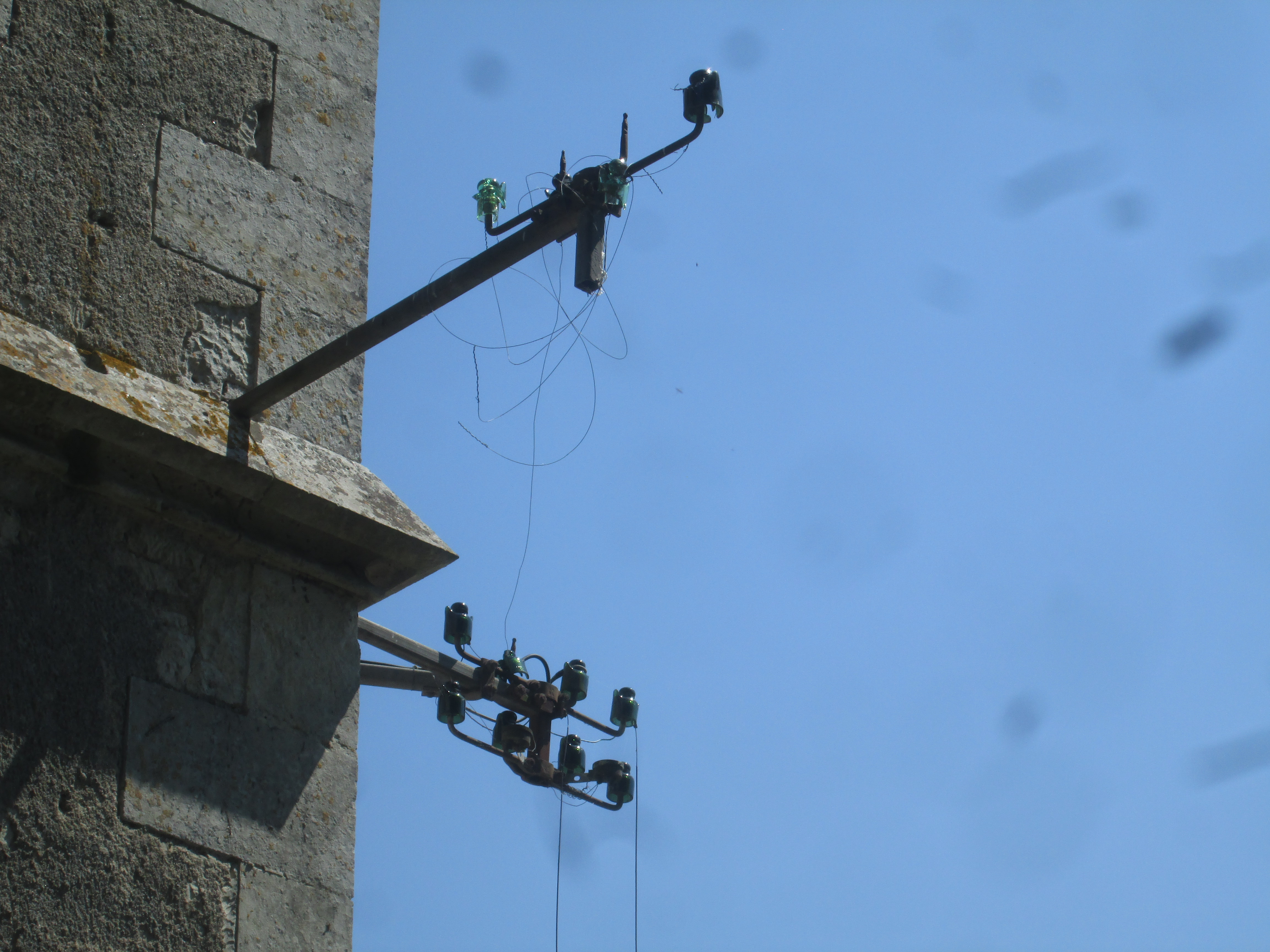 Photographie montrant des vestiges d'installation de téléphone.